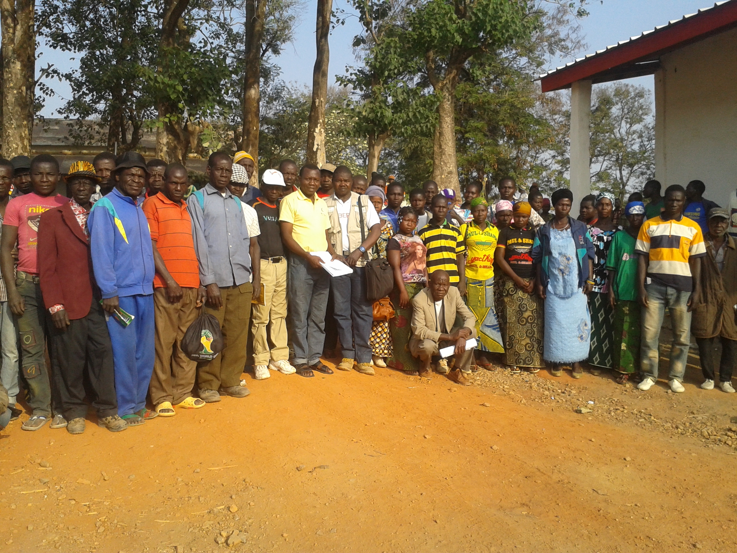 Les participant à la formation sur les semences à Bocaranga en RCA This is an image of Cultural Fashion or Adornment from Central African Republic